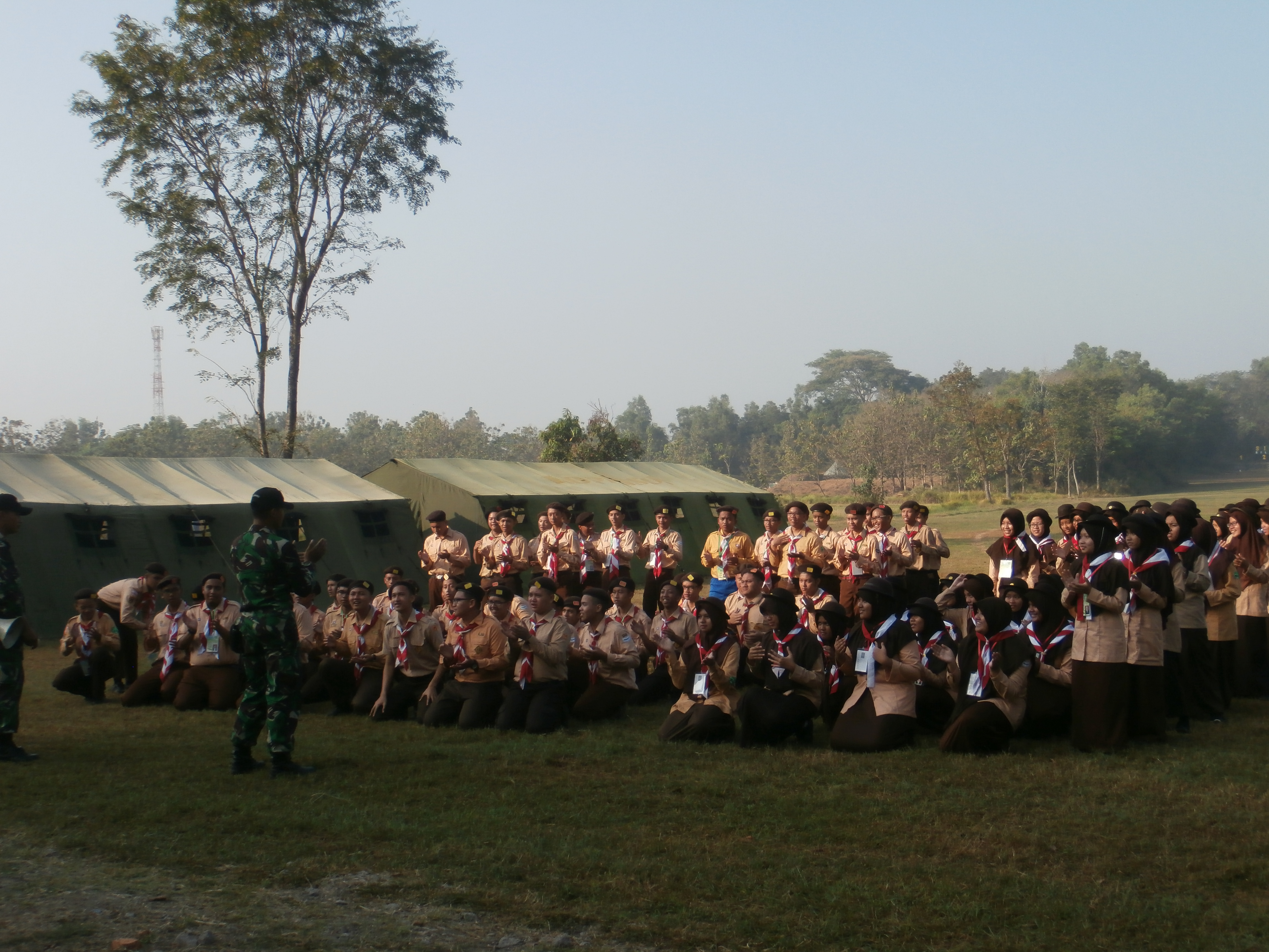 Kegiatan Pendidikan Karakter bagi Murid Baru SMA Islam Al Azhar 14 Semarang di Markas Kopassus Kandang Menjangan yang diselenggarakan dalam rangkaian Masa Orientasi Murid (MOM).